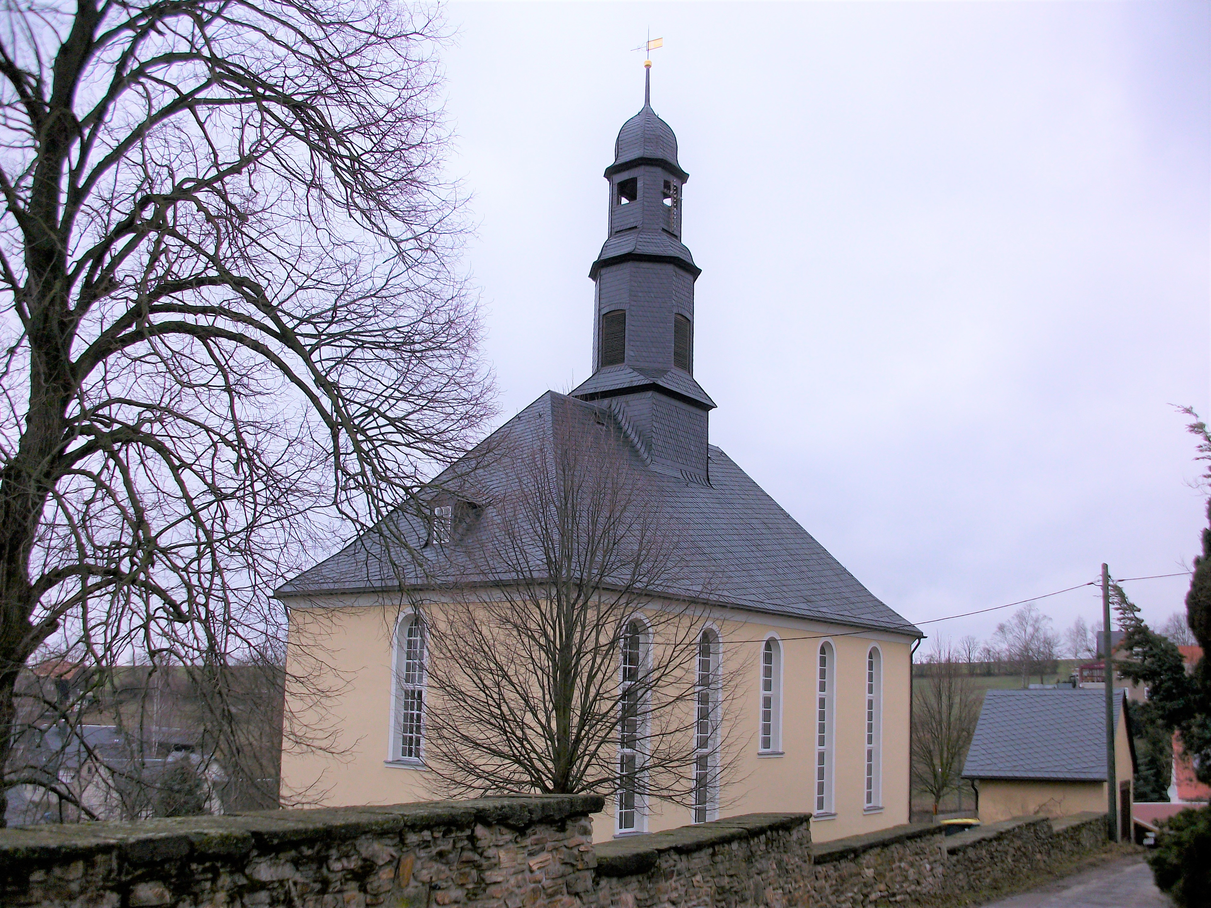 Kirche St. Ludovici Lobsdorf